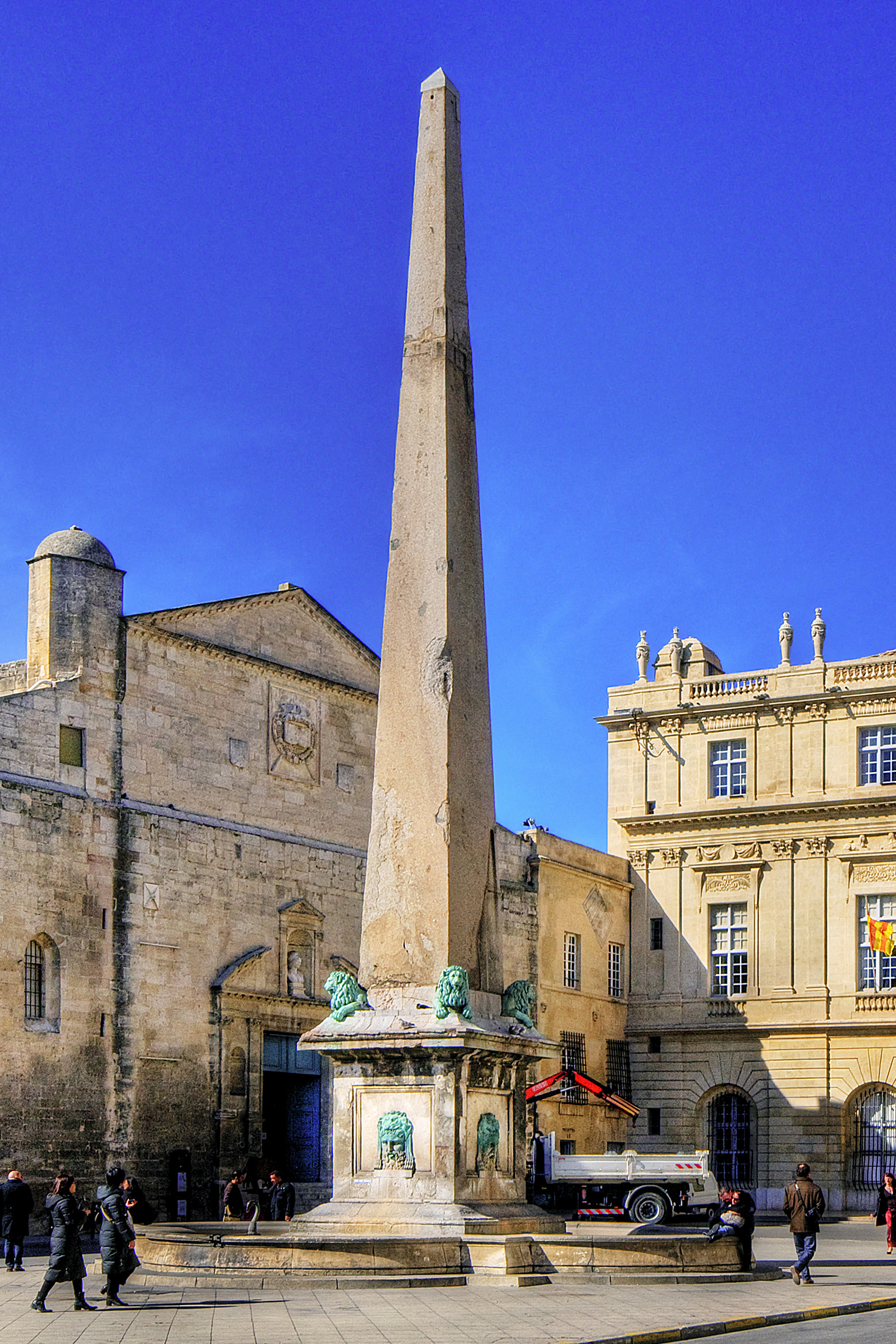 43°40′34.8″N 4°37′39.2″E / 43.676333°N 4.627556°E